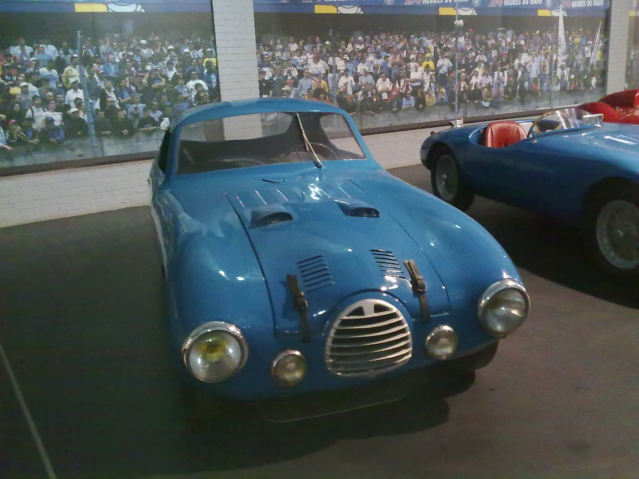 Simca-Gordini, Coupe 15 S, 1950